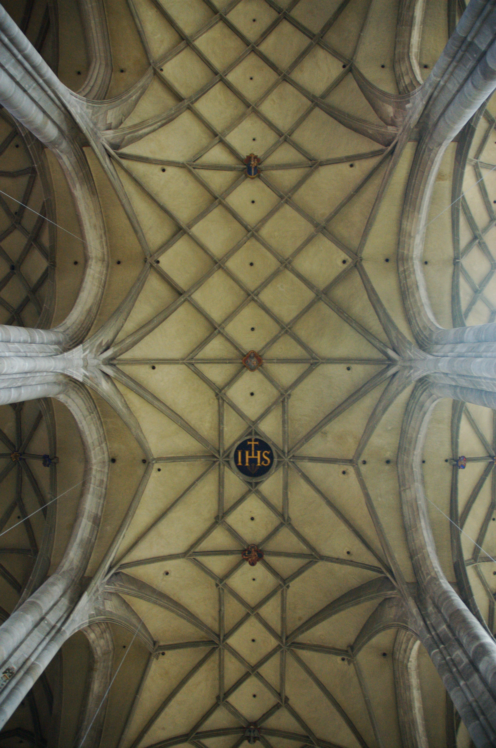 St. Georg Dinkelsbühl, Netzgewölbe mit Christusmonogramm